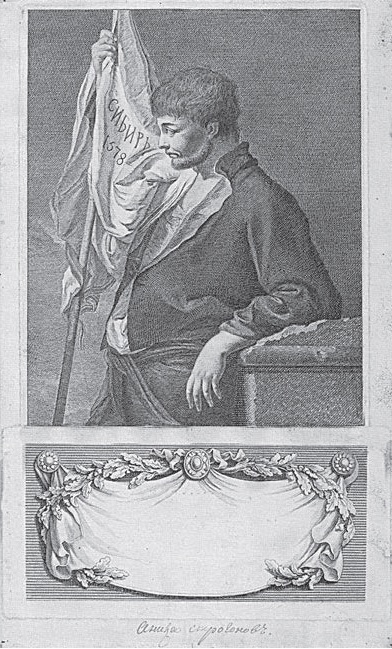 Портрет Аники Строганова. Неизвестный гравер. Перегравировка гравюры А. Цукки. 1780-е гг. Бумага, резец. СПГИХМЗ